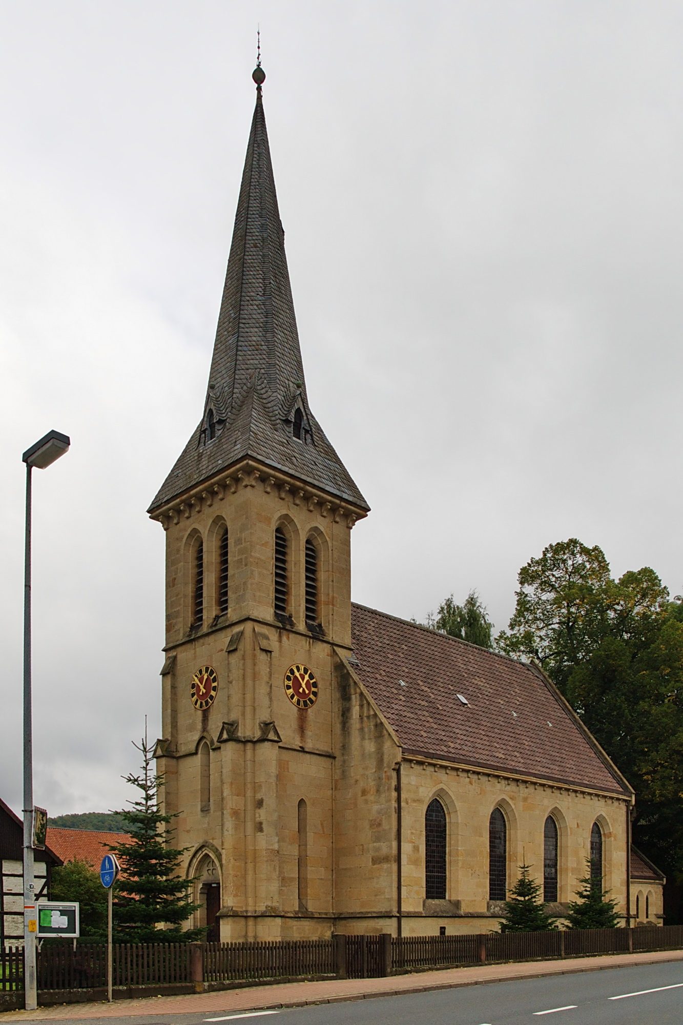 Dorfkirche im Ortsteil Ammensen des Flecken Delligsen, Niedersachsen, Deutschland